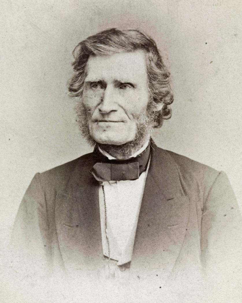 Ludvig Cæsar Martin Aubert, portrett, mann, professor, vignettert brystbilde.